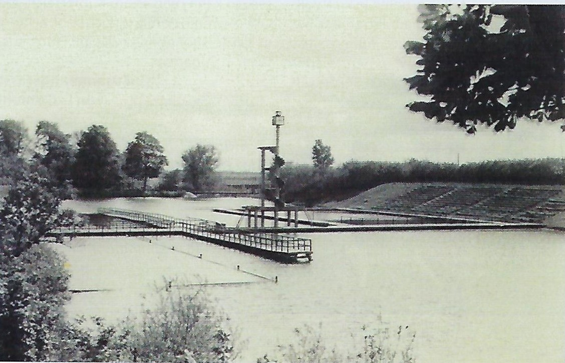 Badeanstalt Kupferteich in den entfestigten Wallanlagen von Königsberg, von der Tapiauer Straße aus gesehen